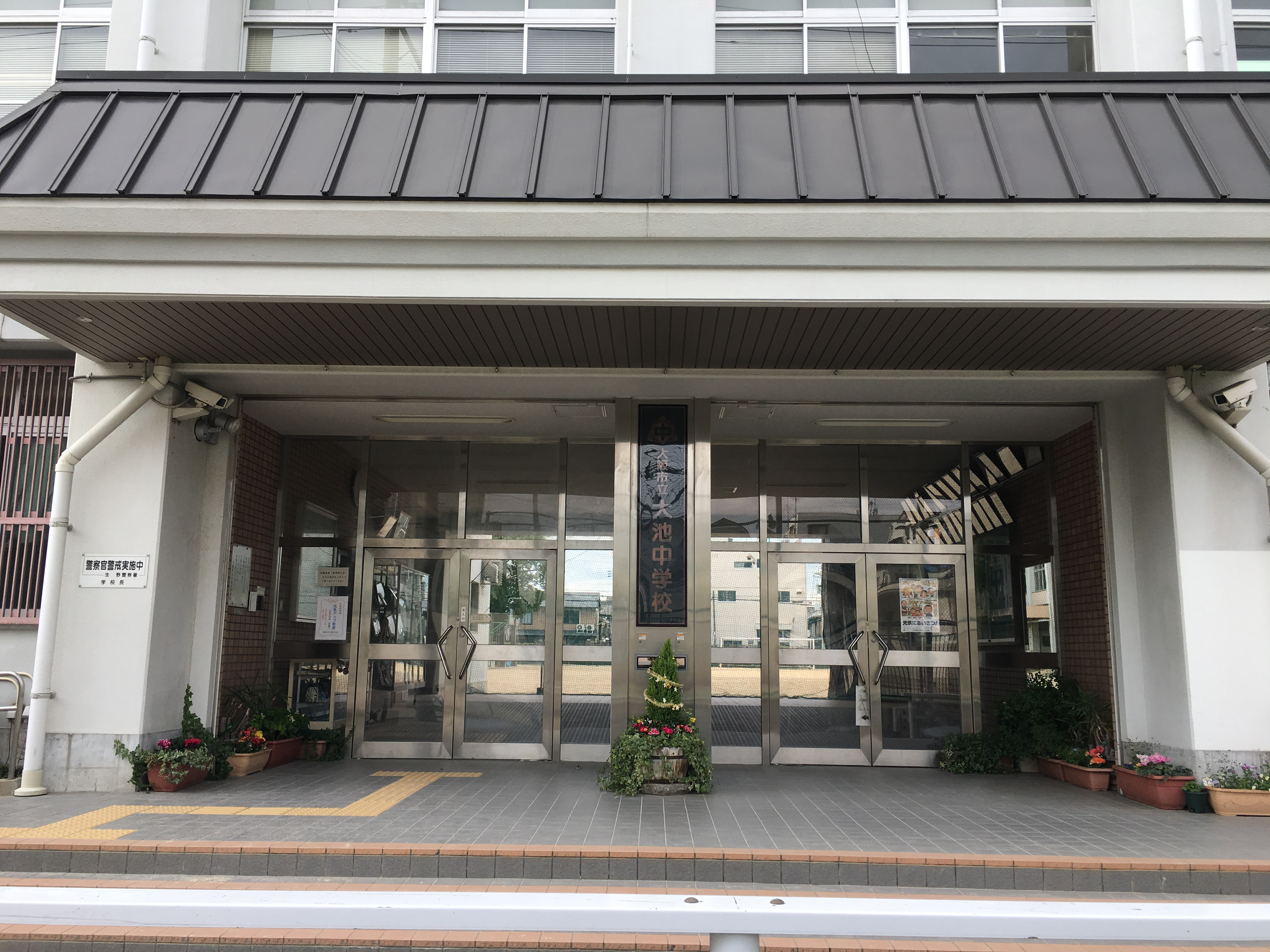 大阪市立大池中学校